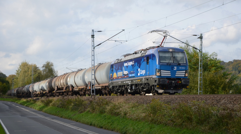 Lokomotivy řady 383 jsou nasazovány především v Německu a Rakousku